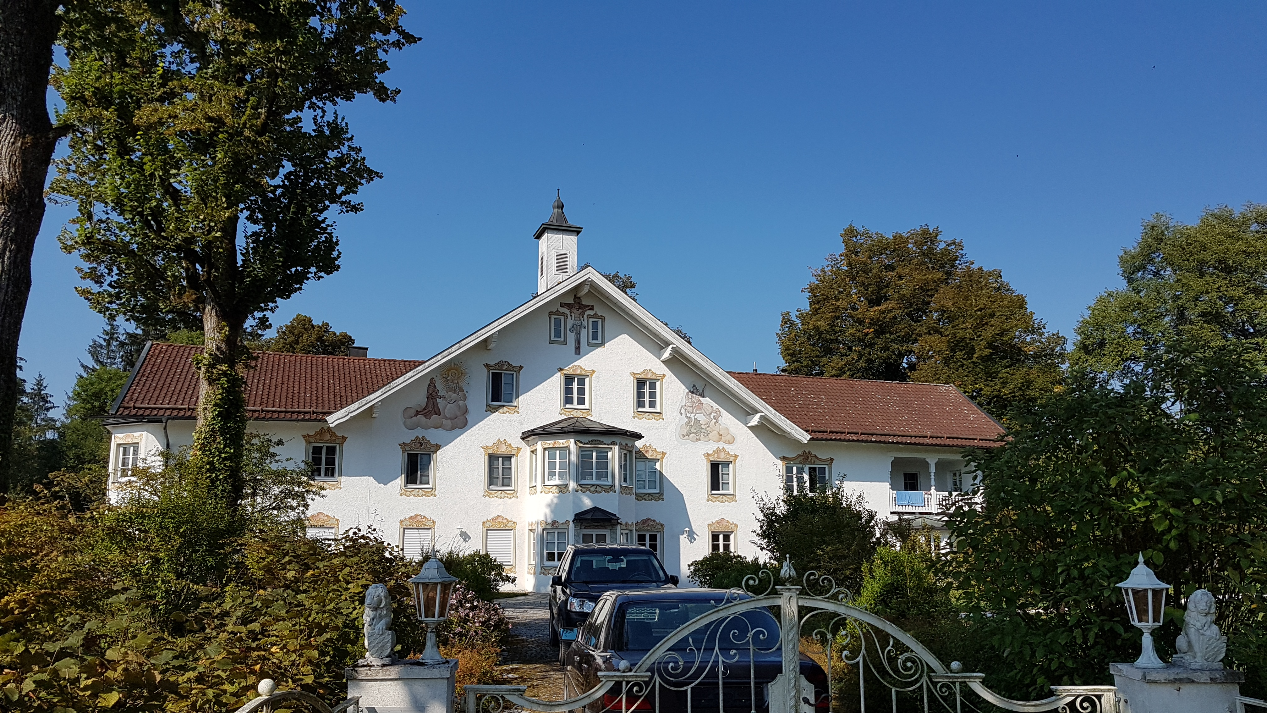 Steinbach (Iffeldorf), Gut bzw. Villa Steinbach (Jaglhof)